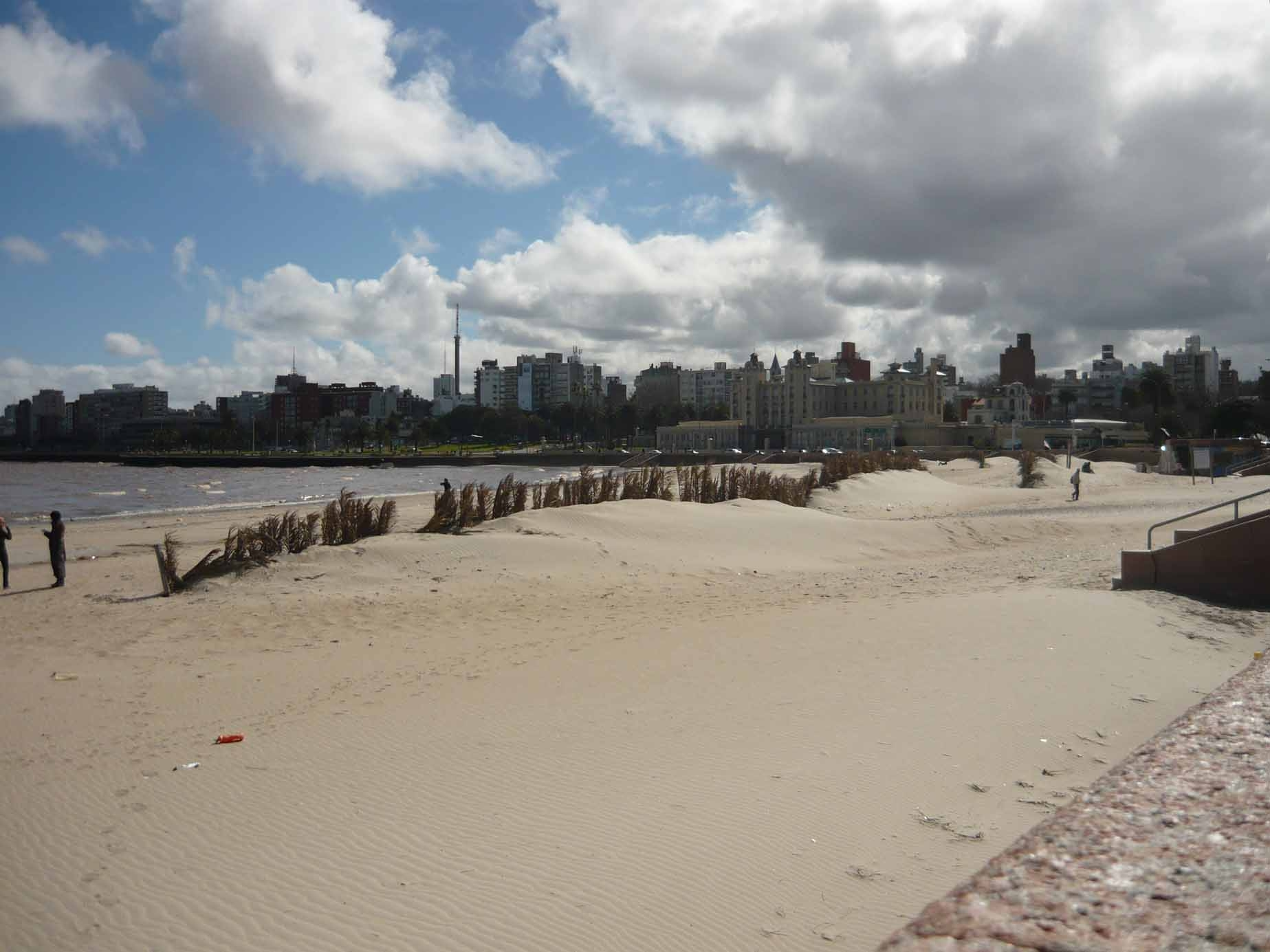 Vista playa Ramírez